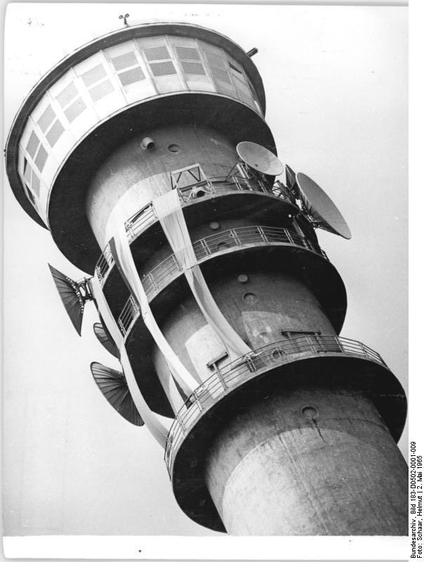 Halle, Fernsehturm Zentralbild Schaar St. 2.5.65 Fernsehturm auf dem Petersberg bei Halle eingeweiht. Der neuerbaute 72 Meter hohe Fernsehturm auf dem Petersberg bei Halle wurde am 1. Mai 1965 eingeweiht.